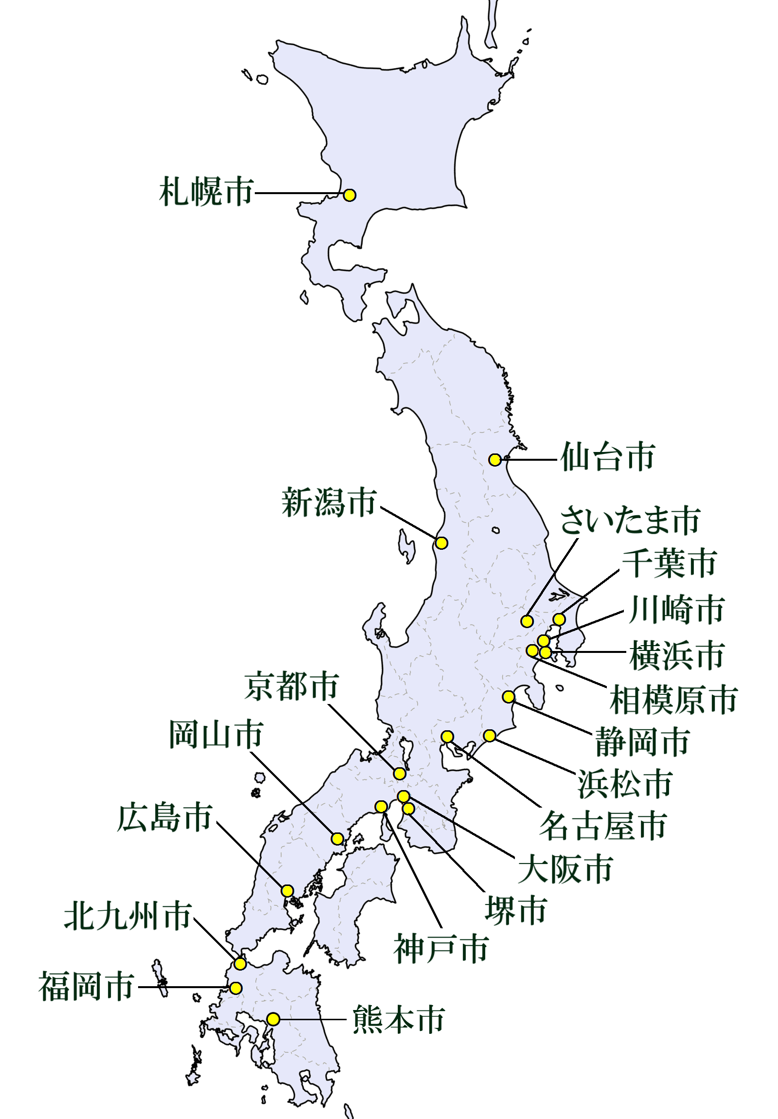 政令指定都市の配置図